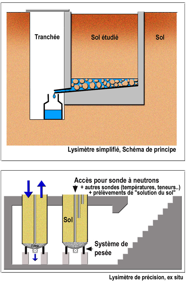 2 types basiques de lysimètres.